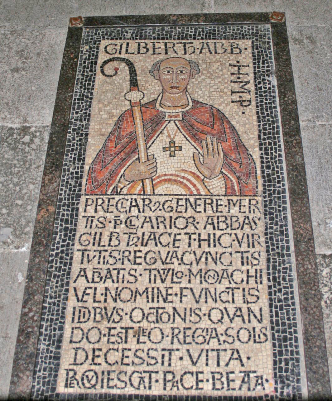 Benediktinerabtei Maria Laach: Graf vum éischten Abt vu Maria Laach.